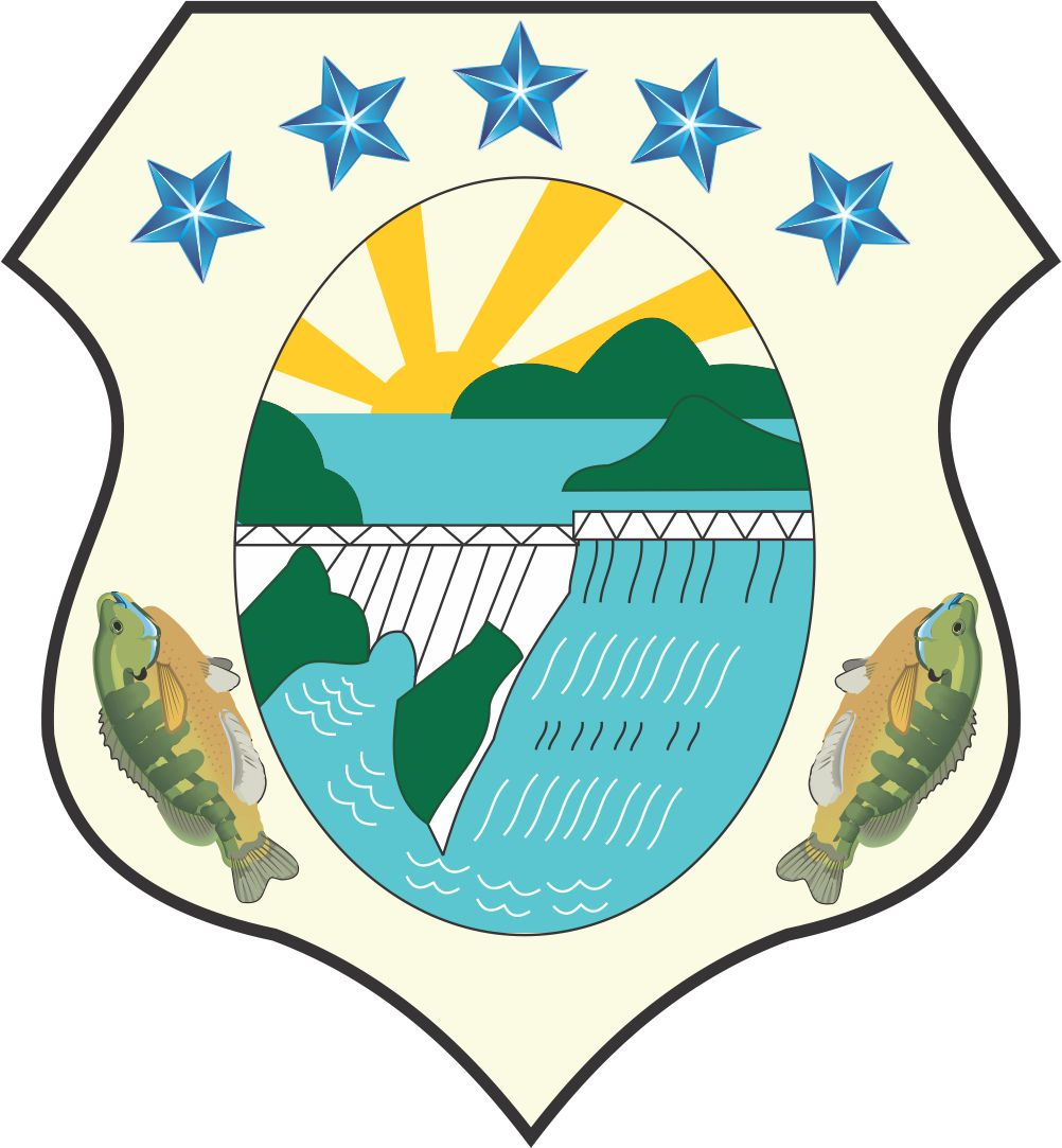 Brasão municipal de Banabuiú-Ce